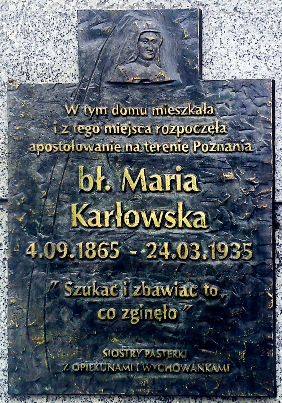 Poznań, dom Marii Karłowskiej - ul. Podgórna. Tablica.